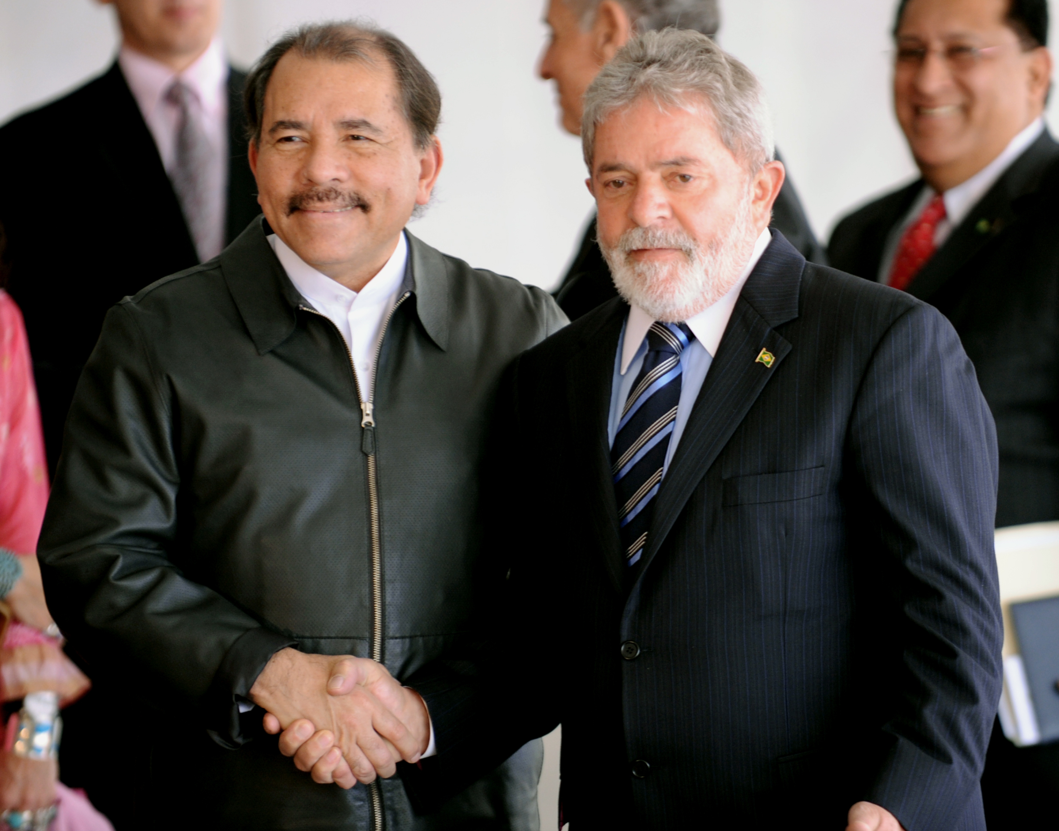 Brasília - Lula cumprimenta o presidente da Nicarágua, Daniel Ortega, no Palácio Itamaraty ( Roosewelt Pinheiro/ABr)